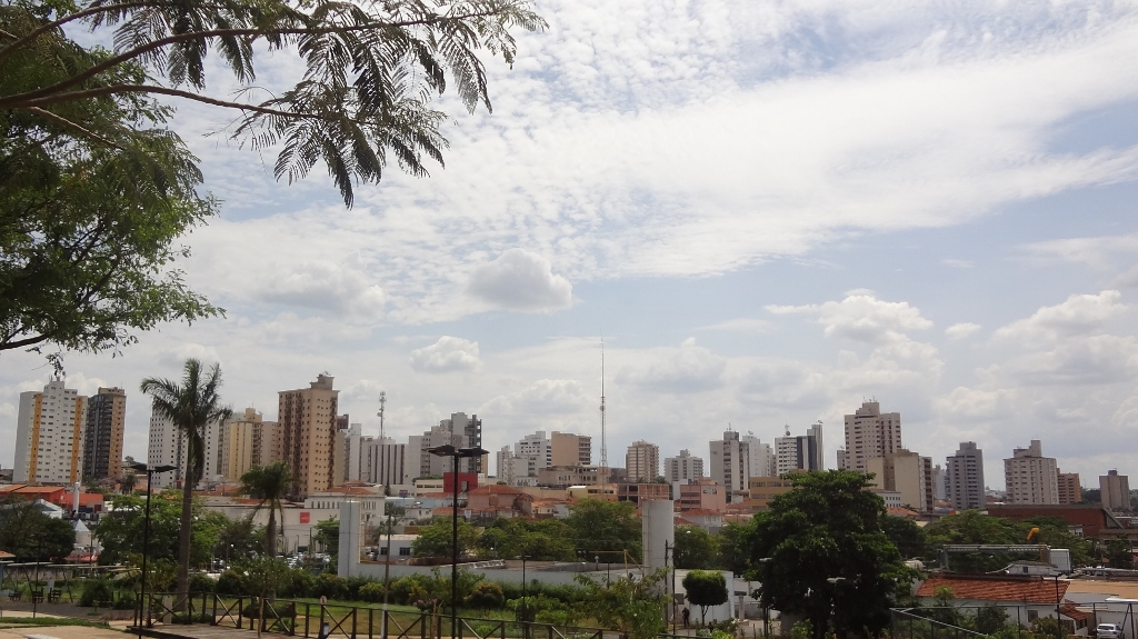 Imagem panorâmica da cidade de Catanduva, SP